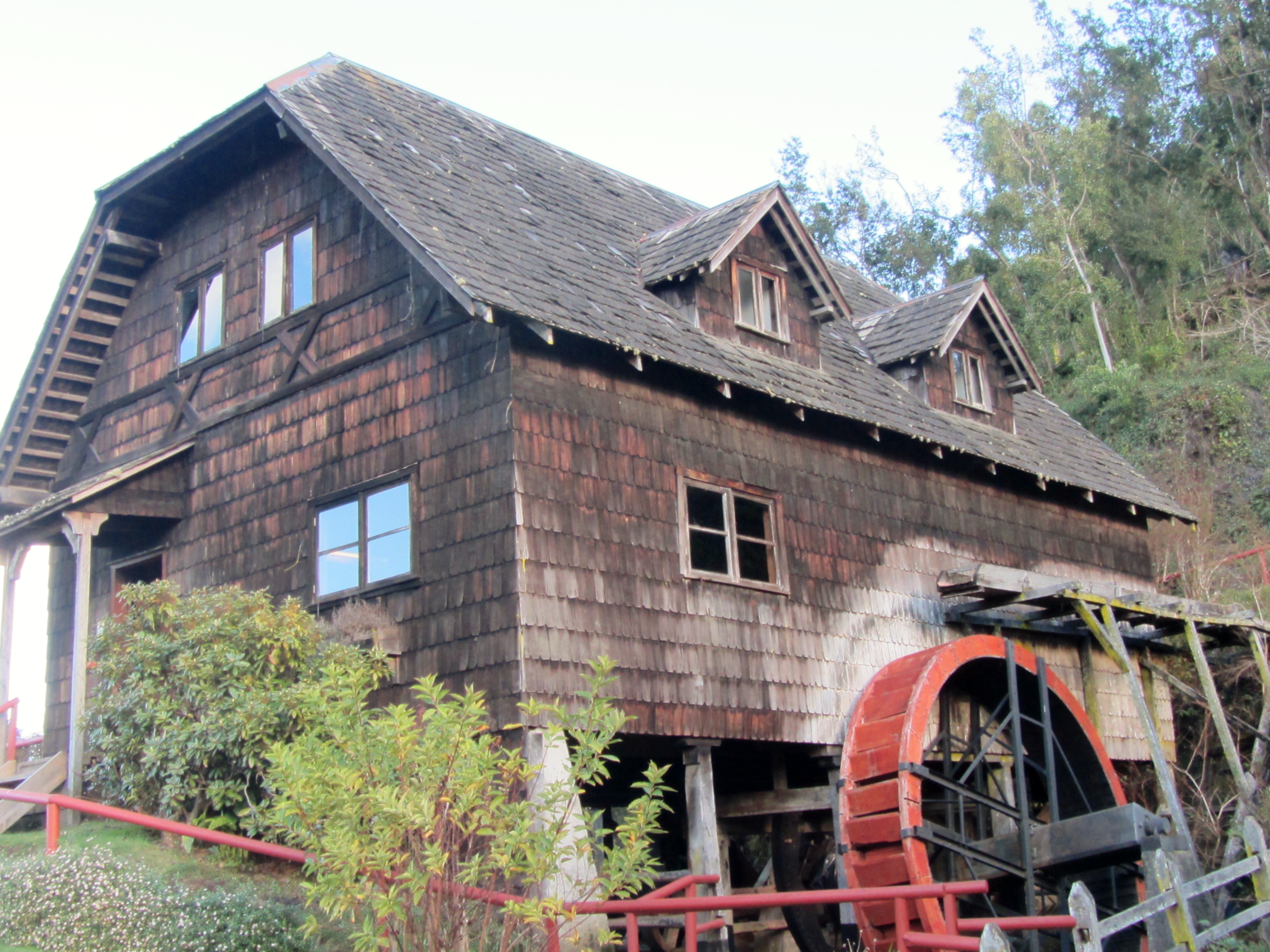 Molino del Museo Colonial Alemán de Frutillar, Chile.